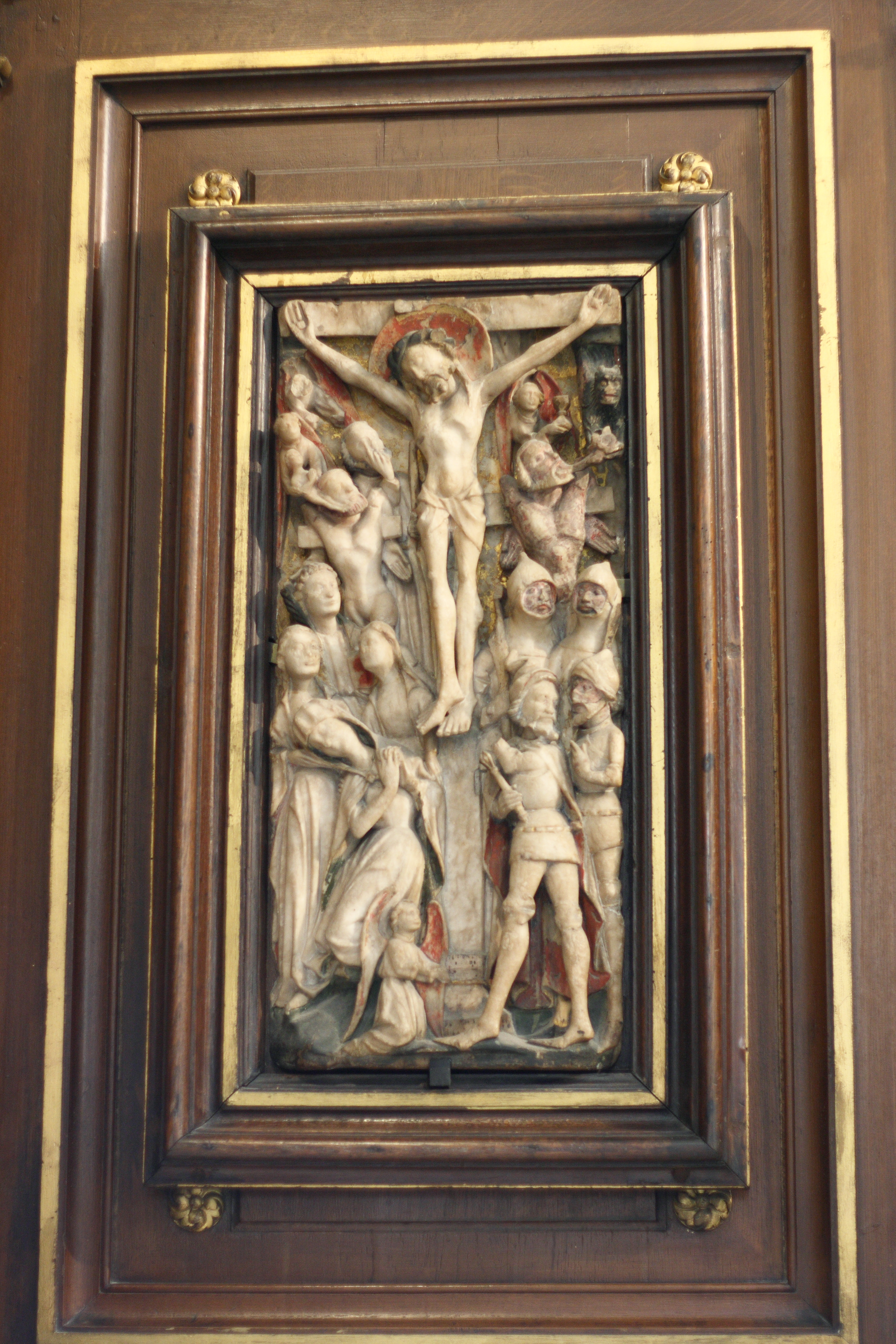 Katholische Pfarrkirche Saint-Louis-en-l'Île im 4. Arrondissement von Paris, Alabsterrelief aus dem 15. Jahrhundert; Darstellung: Kreuzigung Christi